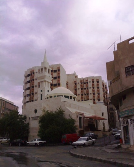 مسجد الأجابة